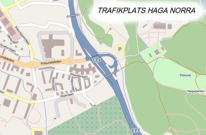 Trafikplats Haga Norra i Stockholm/Solna